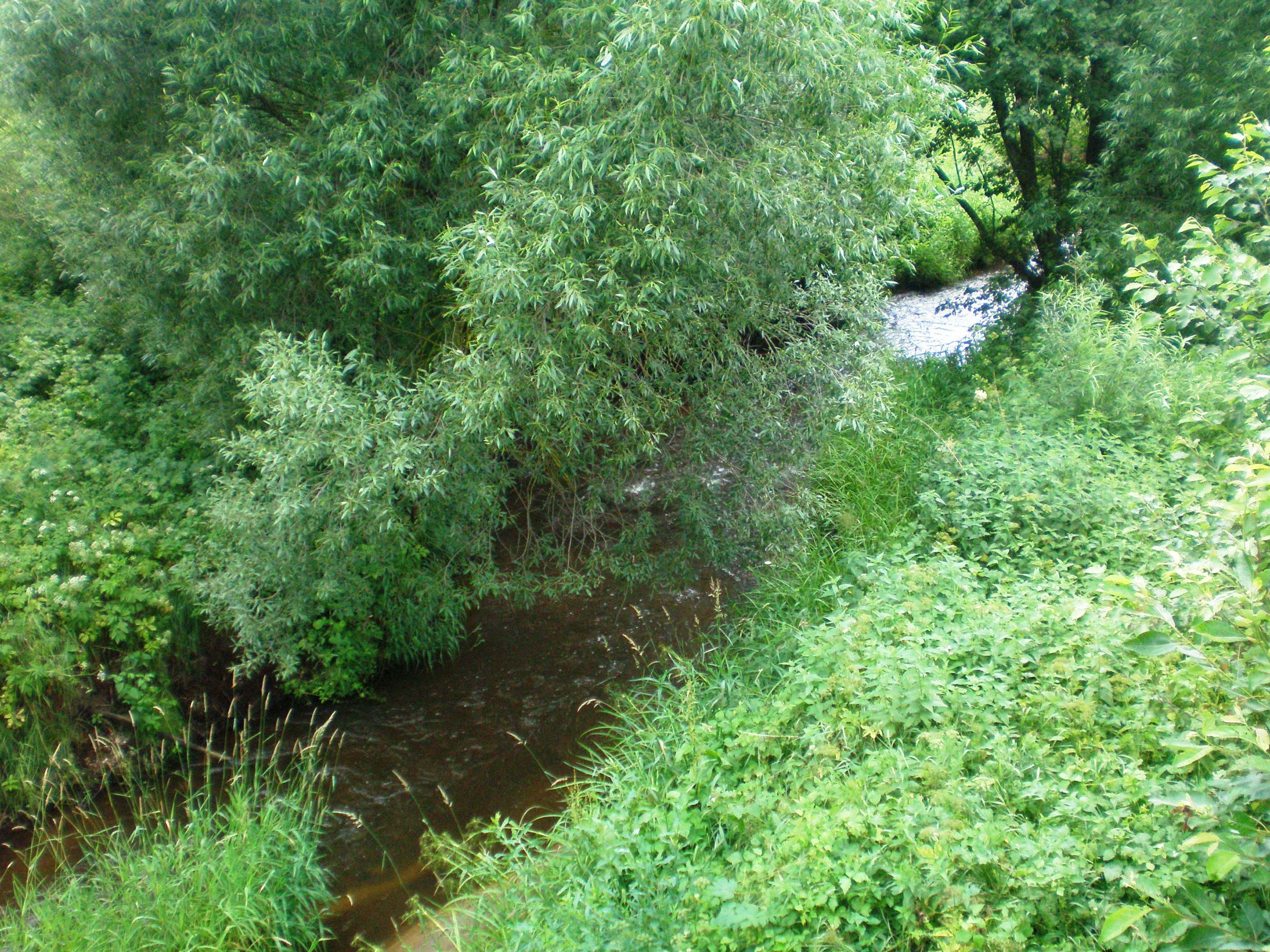 Lapišė netoli Žalpių, Raseinių raj.